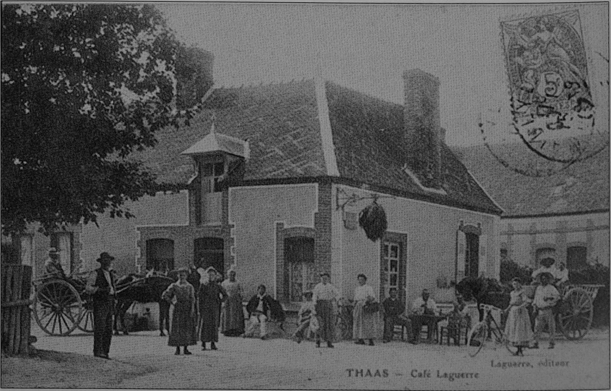 carte postale ancienne.